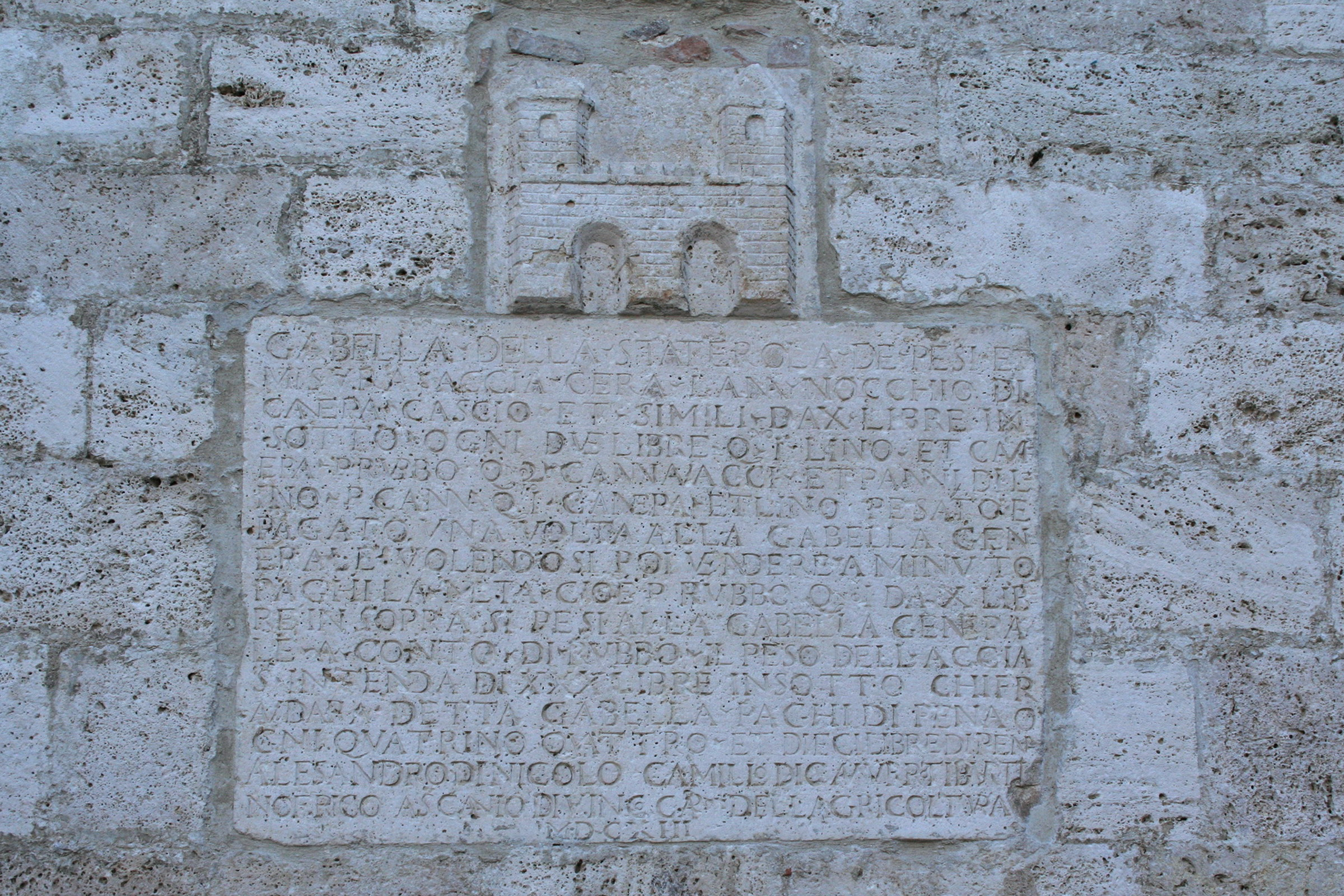 Gabella della Staterola, presso Piazza Ventidio Basso di Ascoli Piceno..